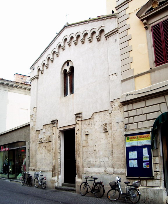 Chiesa di San Pietro, Grosseto, Tuscany (Italy)